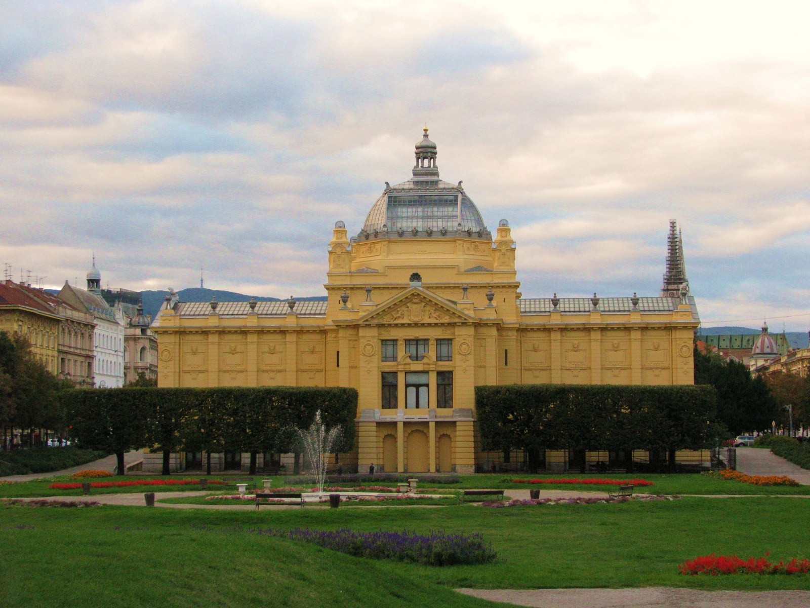 Umjetnički paviljon u Zagrebu